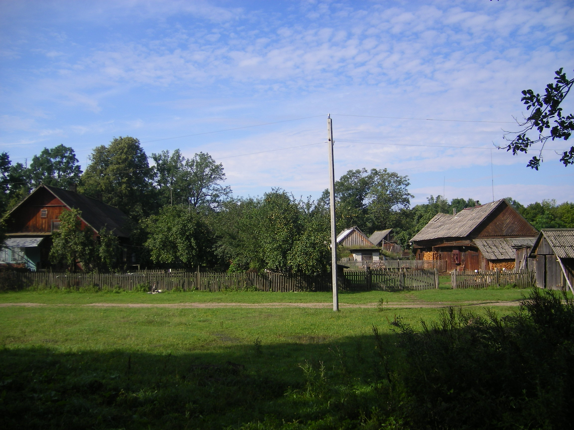 Khvoyniki village in the Belavezhskaya Pushcha